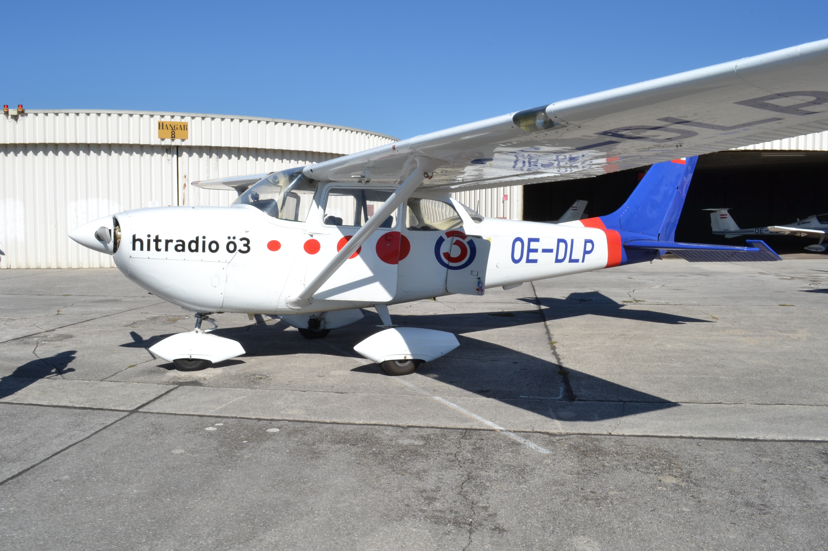 Reims FR-172G Rocket, taken in LOAV, Bad Voeslau, Austria, operated by Fliegergruppe Wien